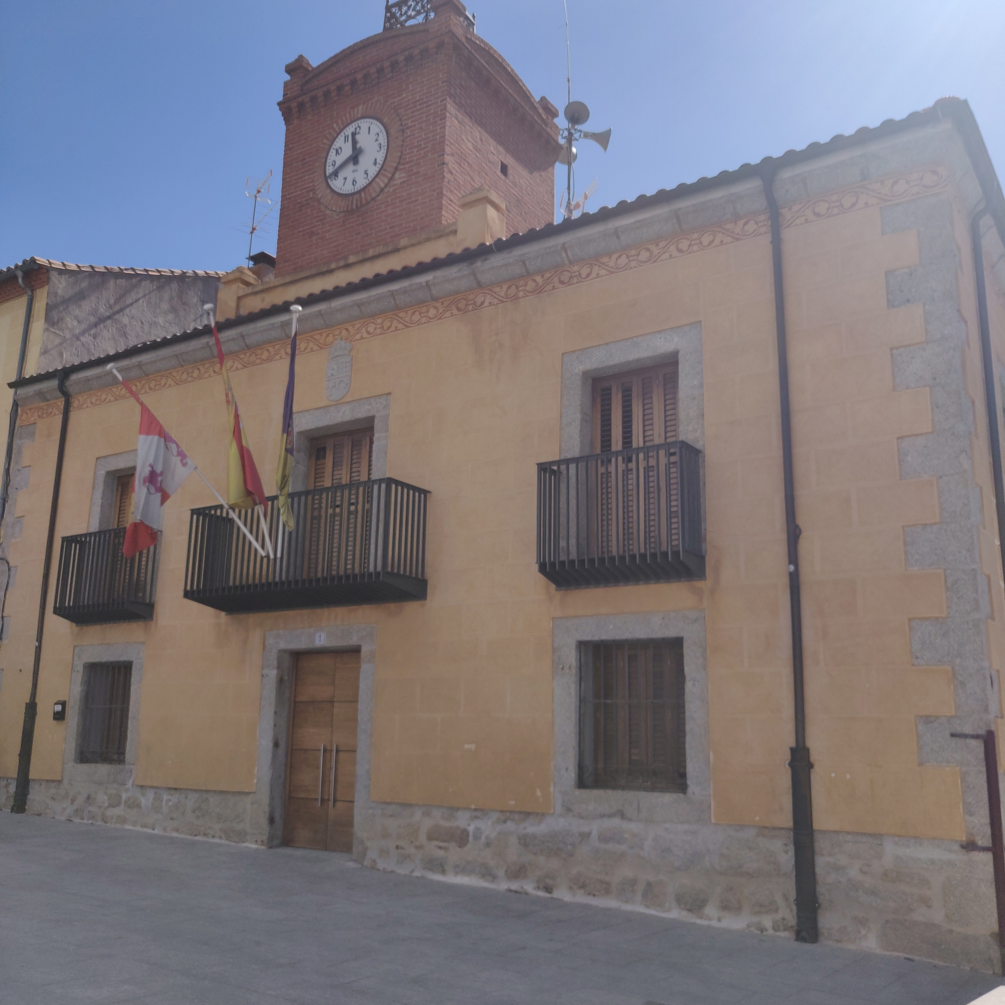 Ayuntamiento de Burgohondo (Ávila)